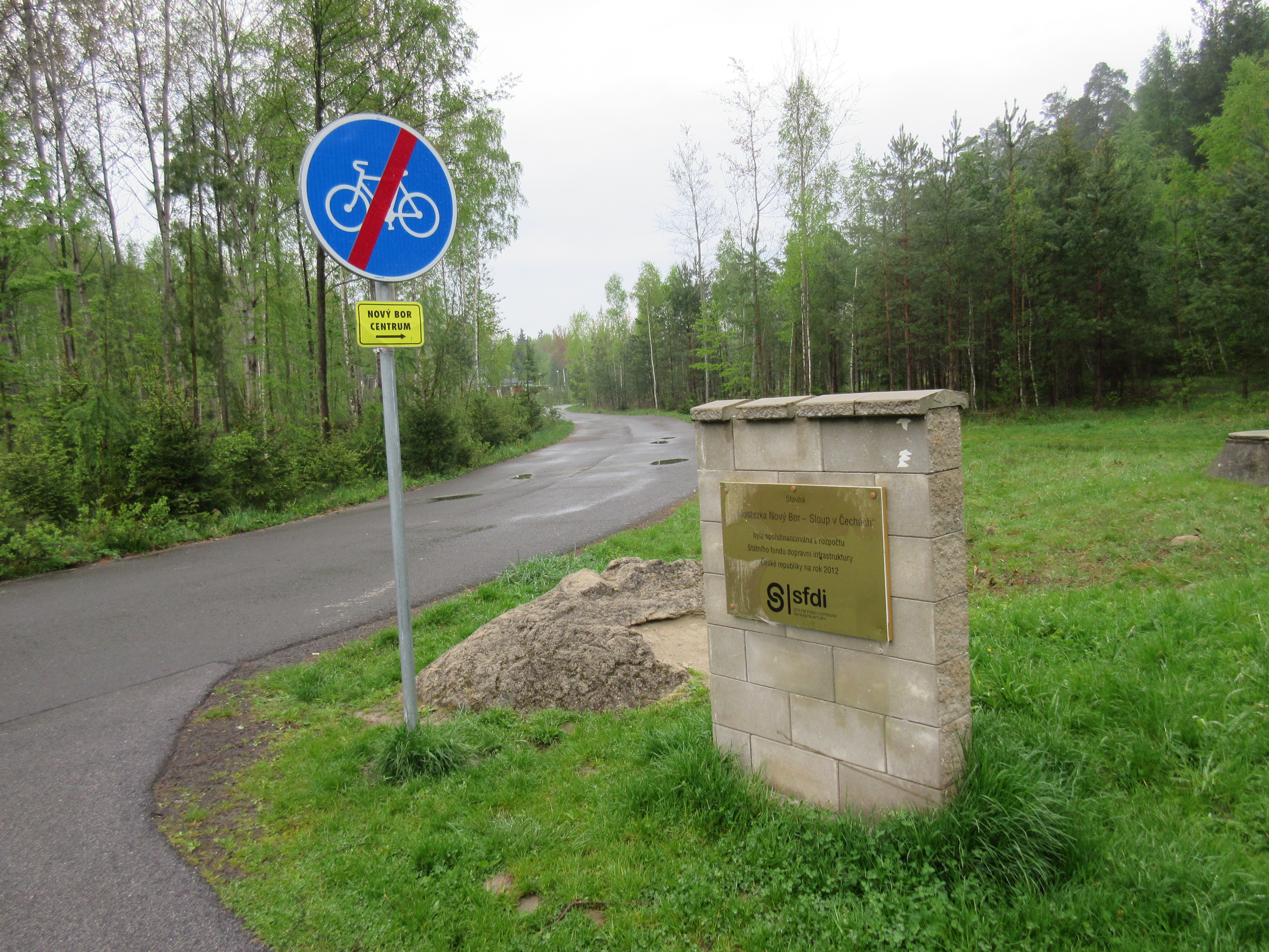 Tabule k cyklostezky